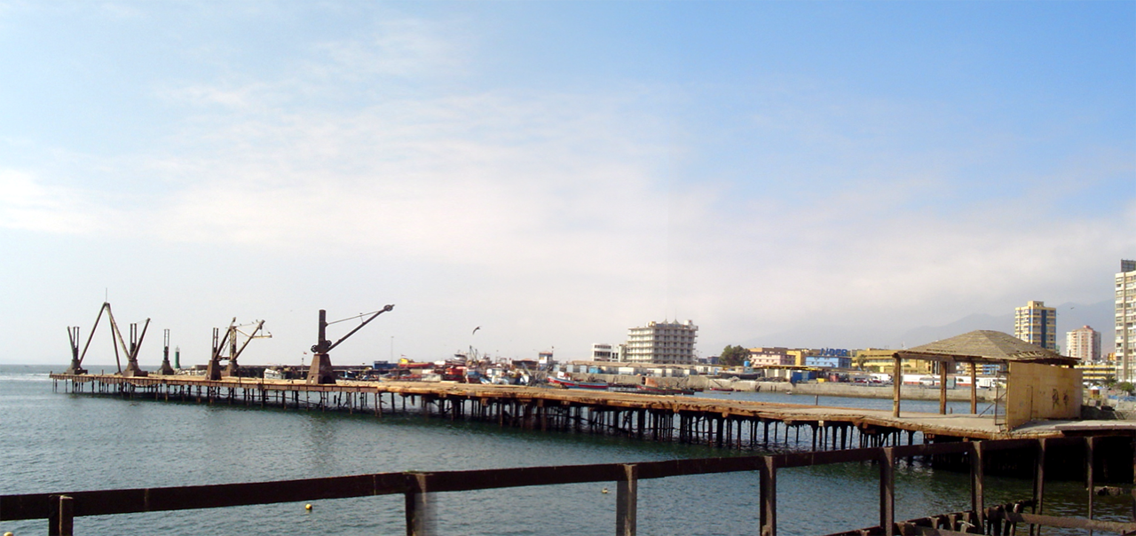 Muelle salitrero Compañía Melbourne & Clark, conocido como Muelle Histórico. Inserto dentro del Barrio Histórico de Antofagasta, Chile. Monumento Histórico nacional. Source: [1] Date: 12/11/2005 Author: Marcos Escalier